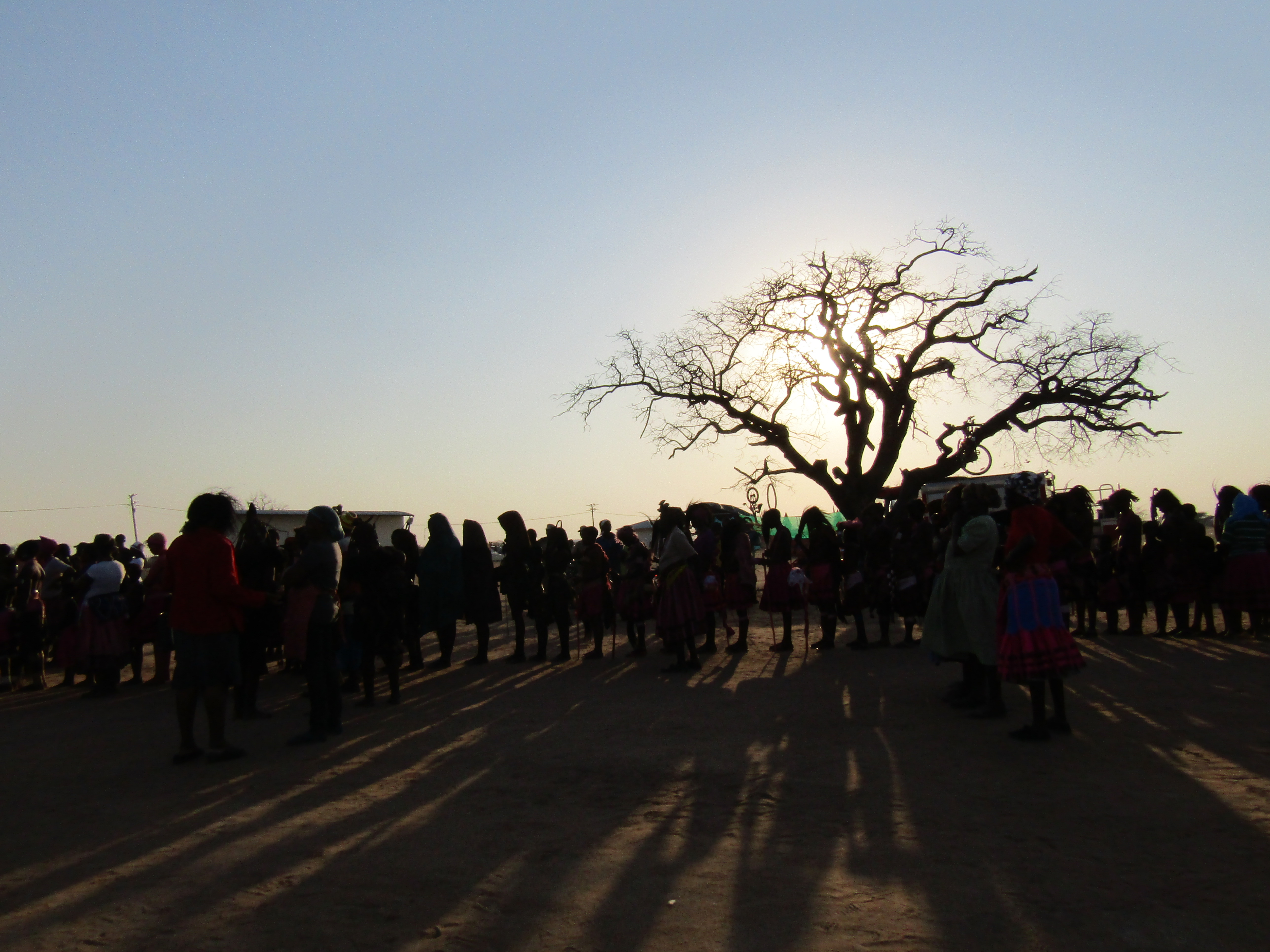 Initiationsaufmarsch beim Olufuko Festival 2016